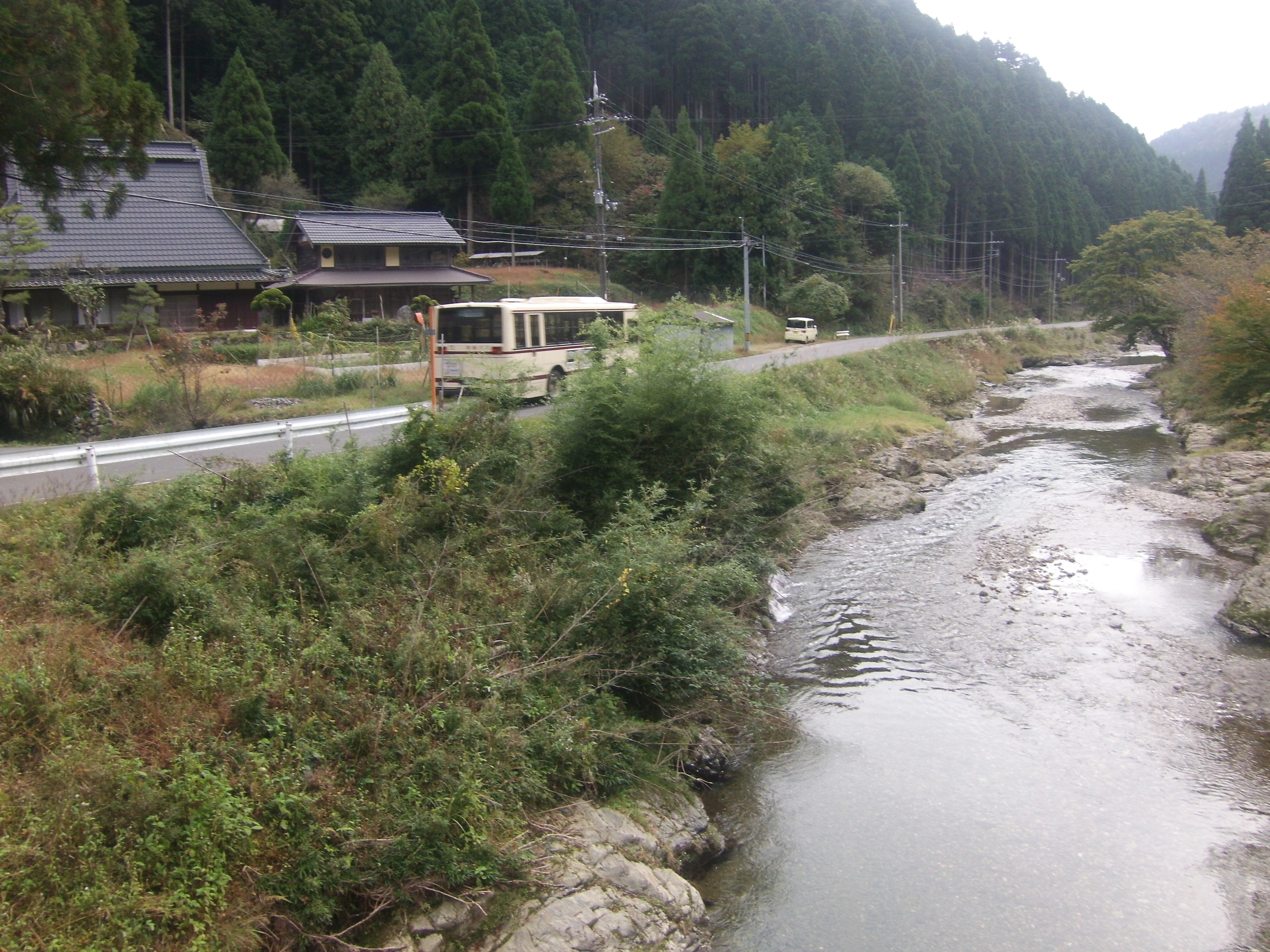 桂川源流と並行する京都府道38号線（花脊界隈）を走る京都バス最長路線の32系統花脊線